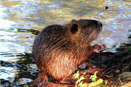 Coipo (Myocastor coypus)